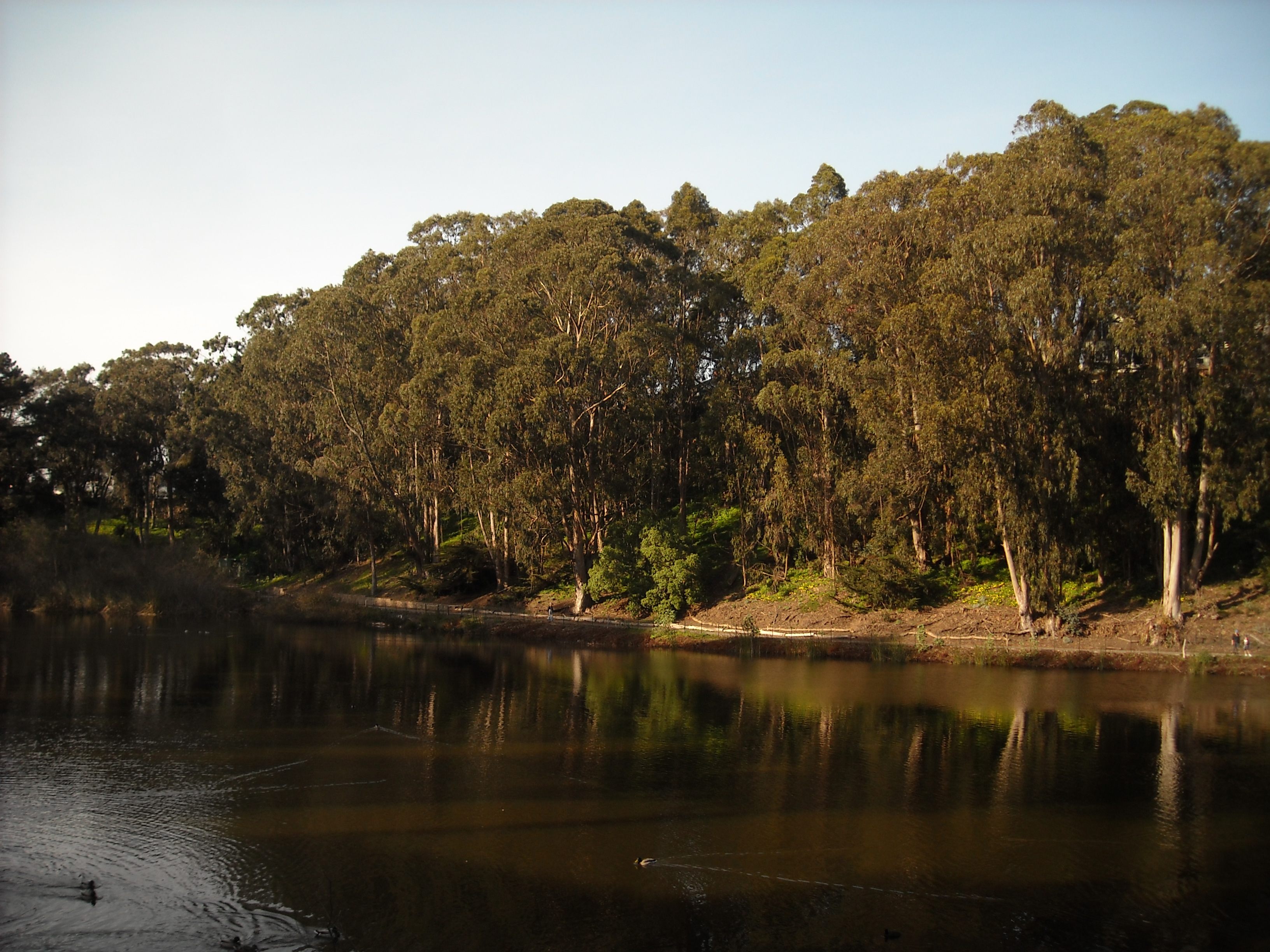 Puerca Laguna @ Stern Grove